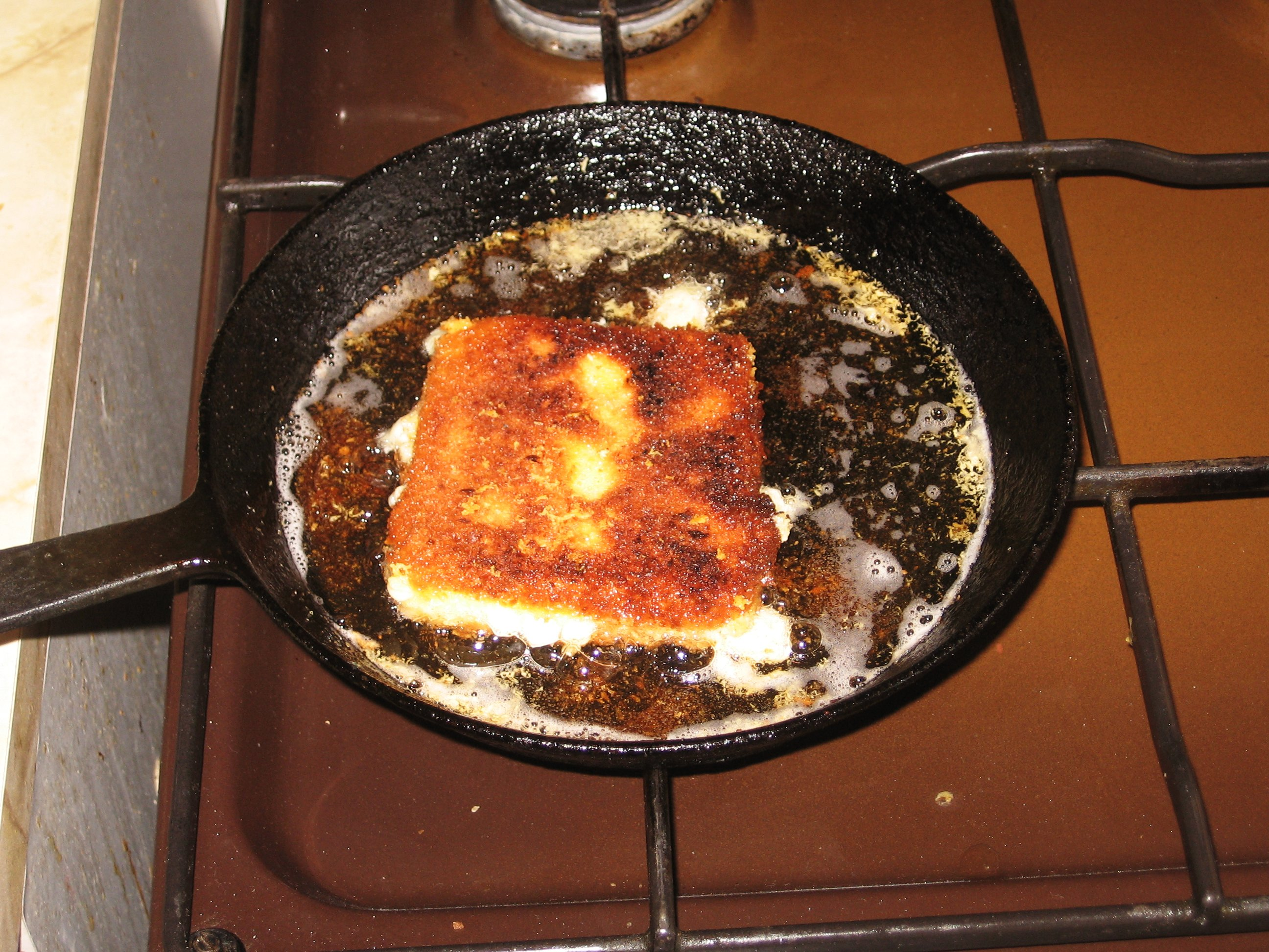 smažení druhé strany smaženého sýra